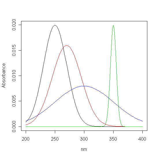 LBOZ - syntetyczne widma 4 związków. Kryteria LBOZ wynoszą: 0.561 dla czarnego, 0.402 dla czerwonego, 0.899 dla zielonego i 0.549 dla niebieskiego.